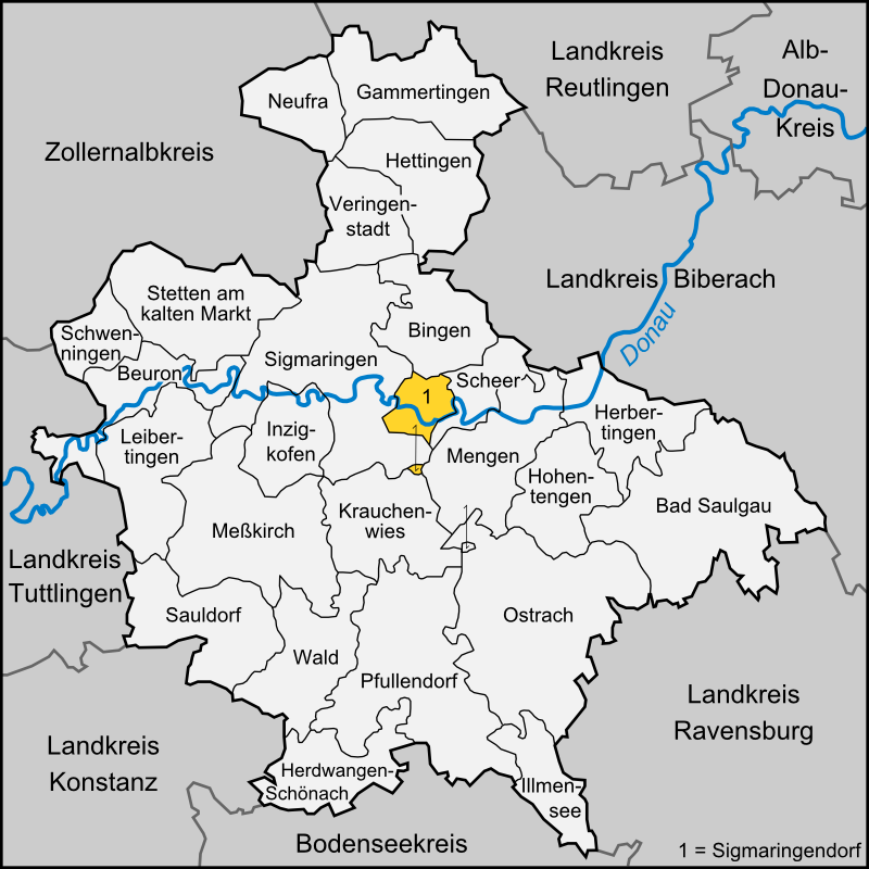 Karte der Gemeinde Sigmaringendorf im Landkreis Sigmaringen